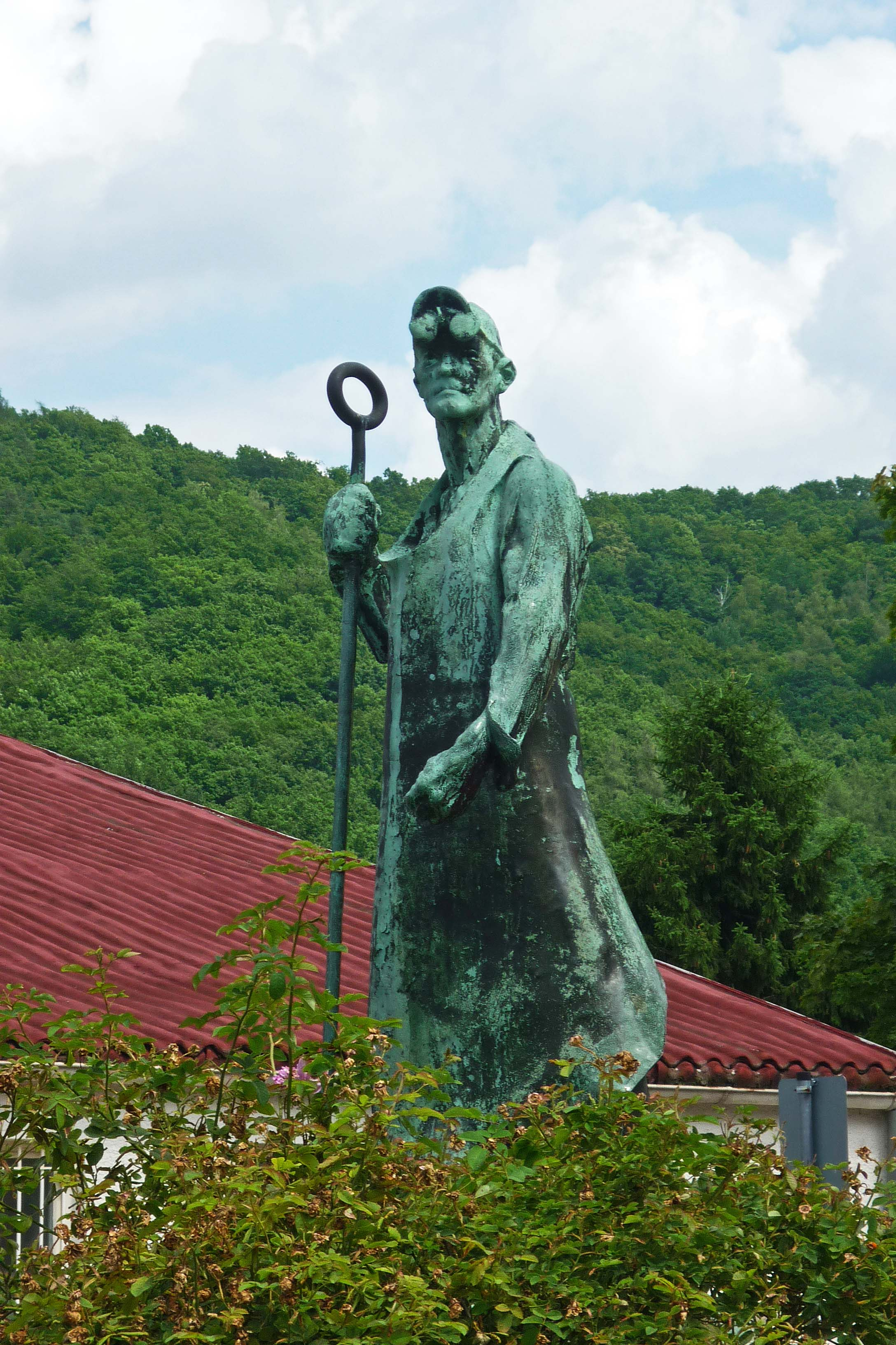 Stahlarbeiter-Plastik von Friedrich Press in der Wilhelm-Müller-Str. 14 in Freital-Niederhäslich (1953)